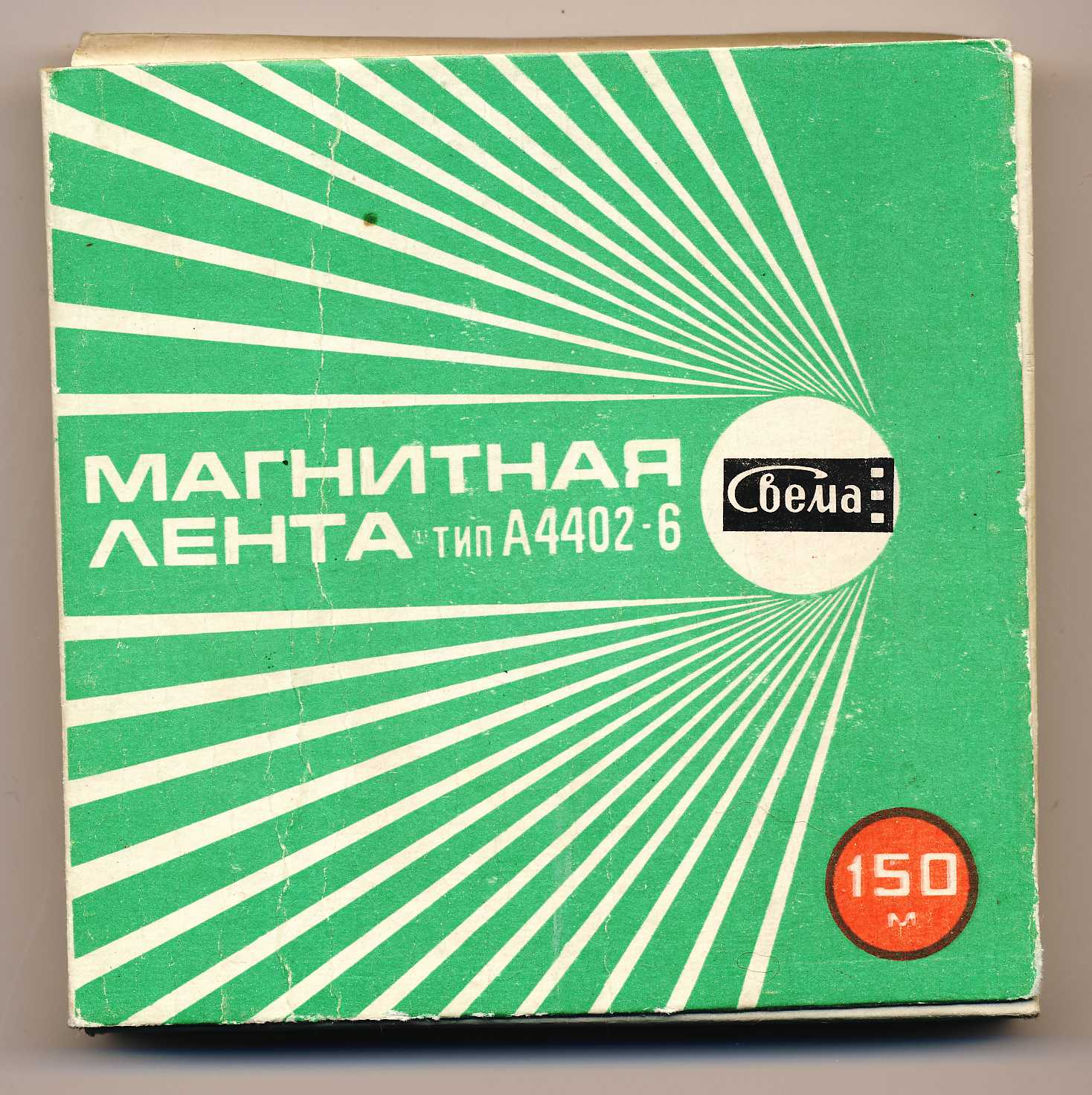 Магнитная лента